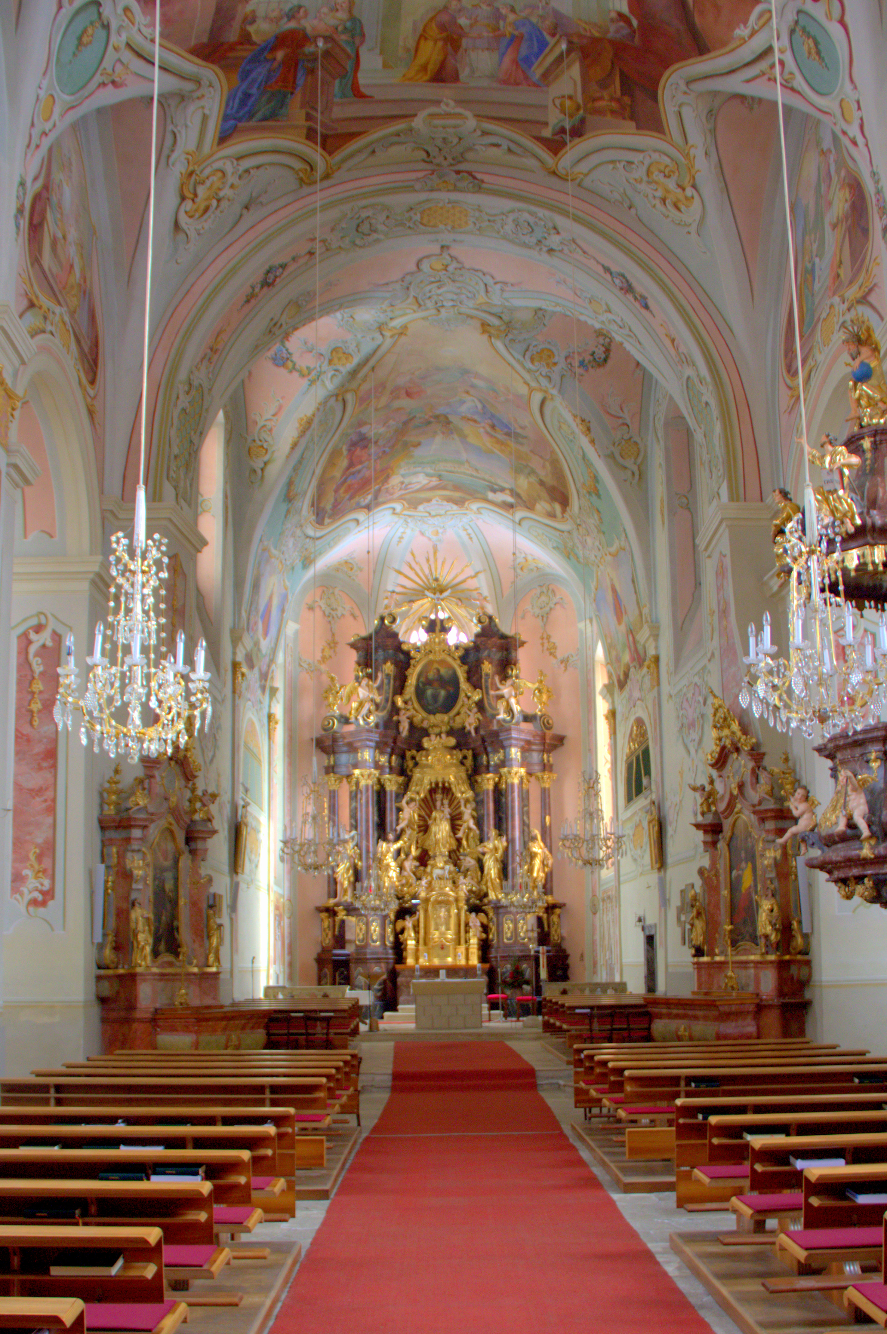 Kath. Filialkirche Maria Lebing, Innenansicht, Hochaltar